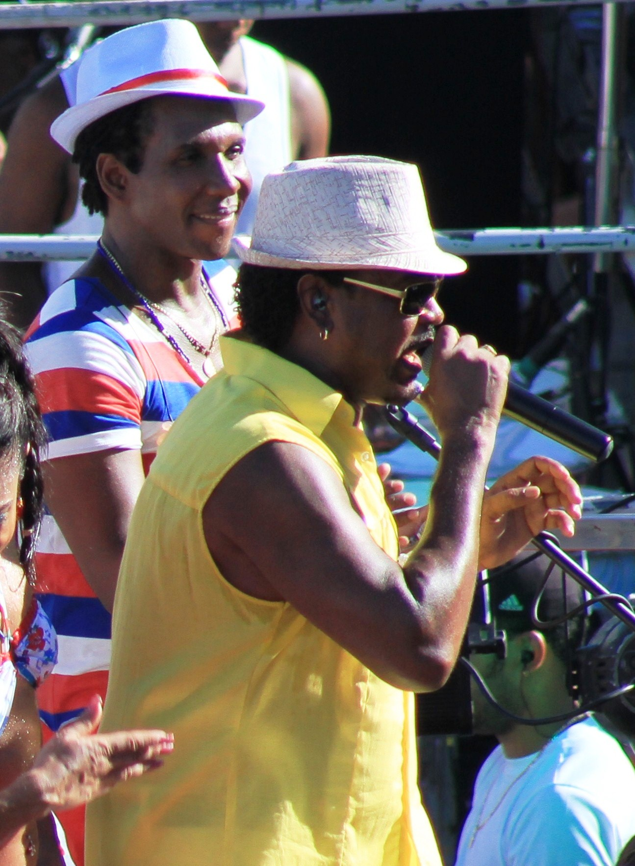 É o Tchan! no Carnaval de 2011.